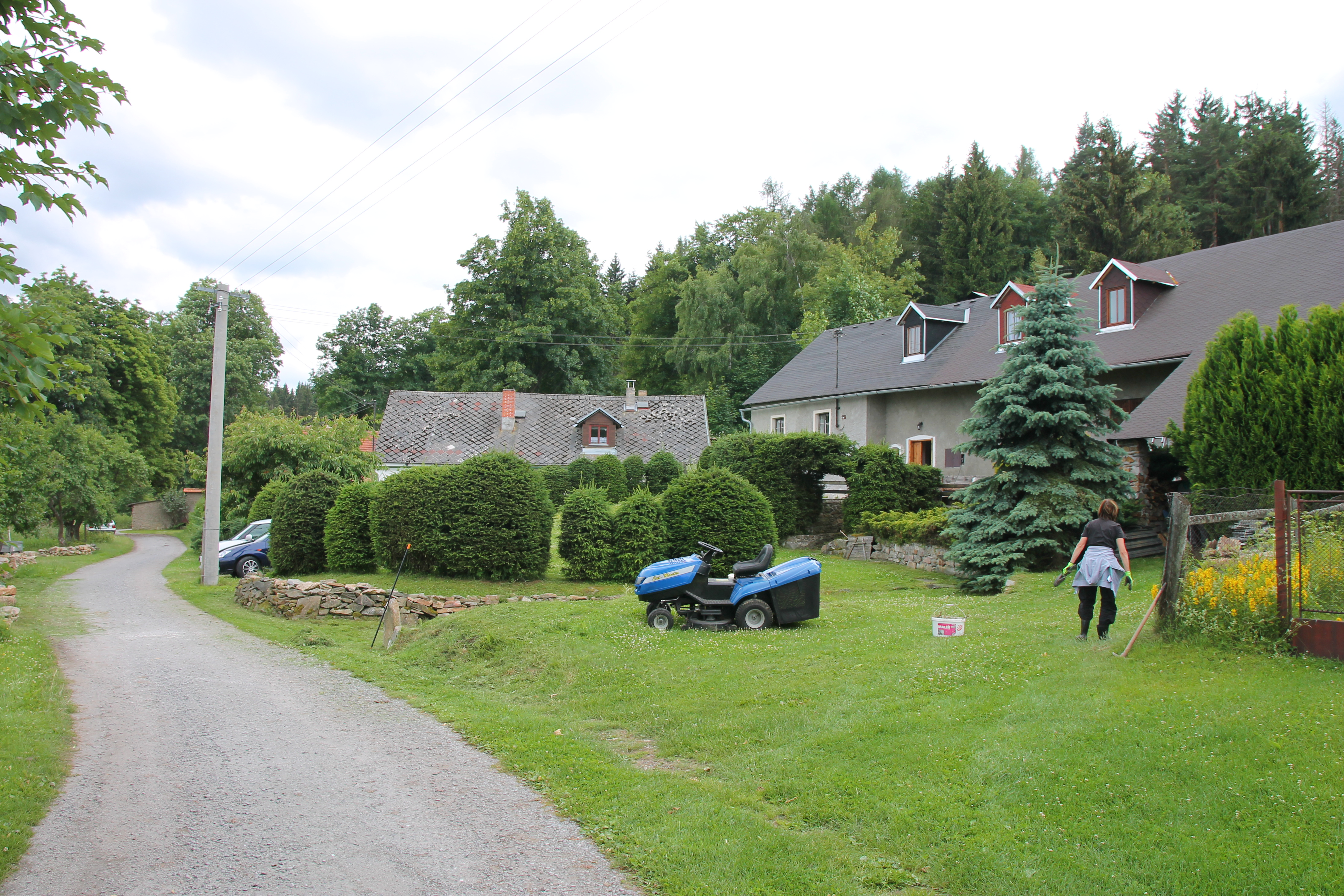 Chalupy v Ptákově Lhotě